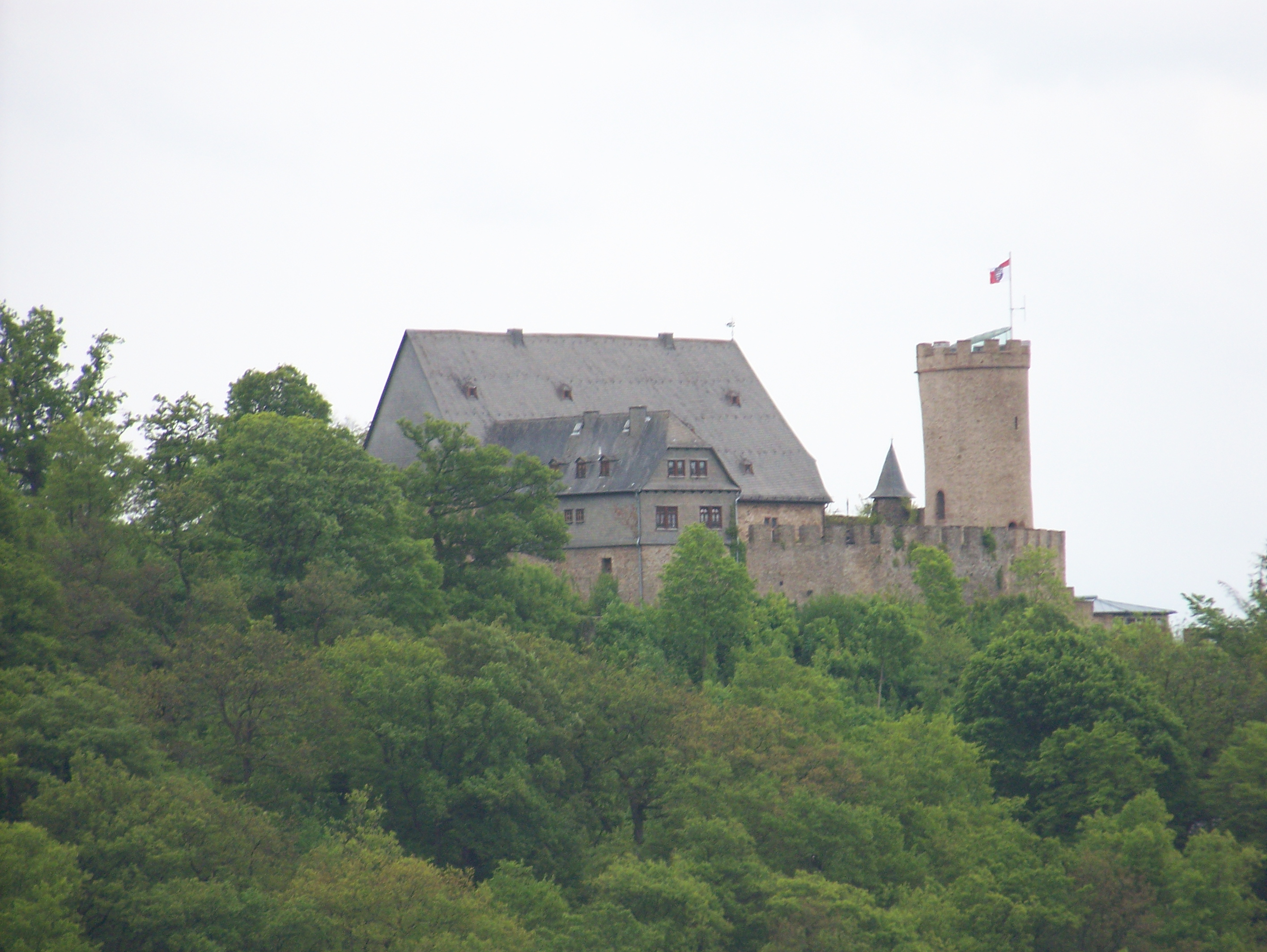 Ansicht von Westen